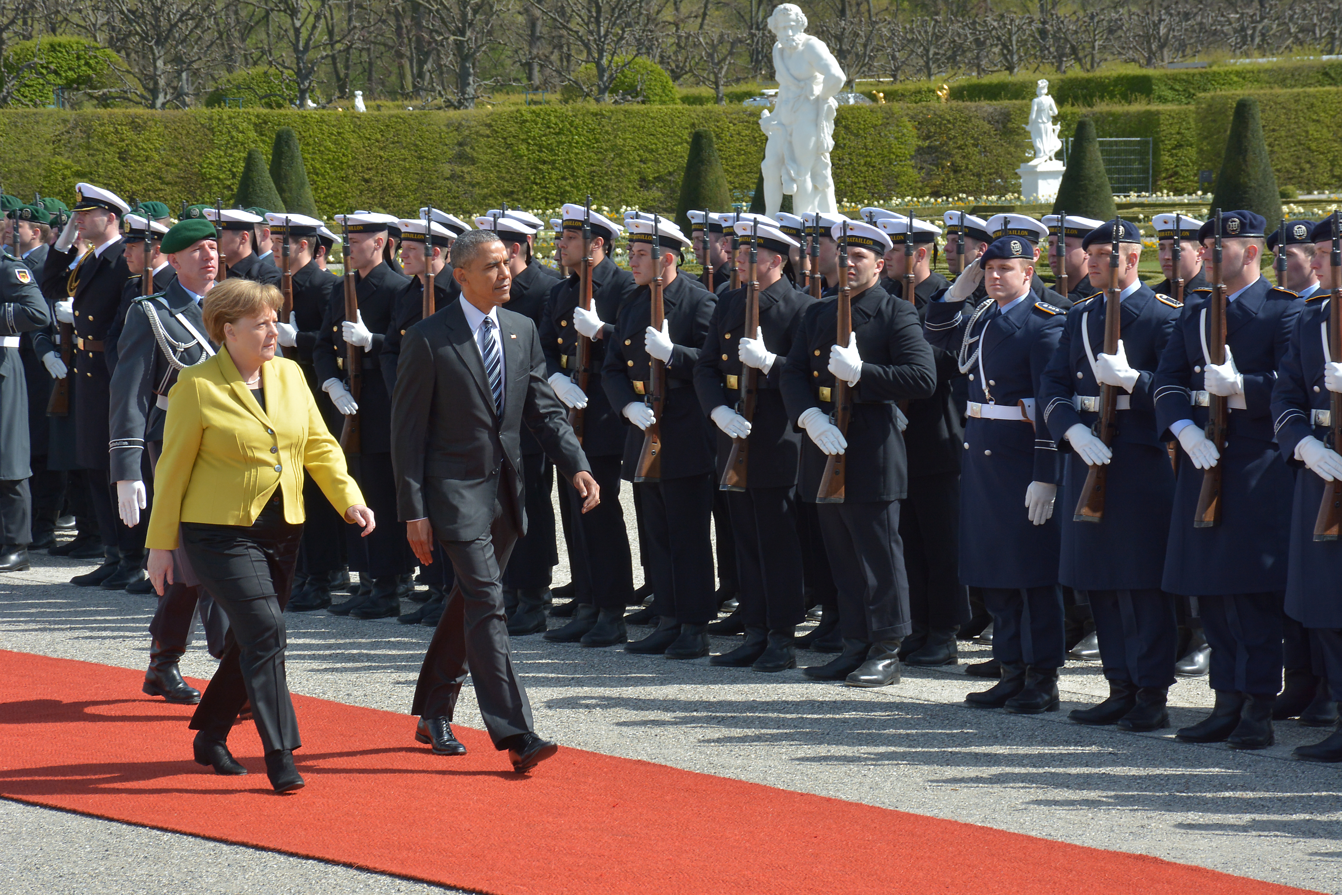 Begrüßung von US-Präsident Obama durch Bundeskanzlerin Merkel mit Militärischen Ehren vor dem Schloss Herrenhausen in Hannover